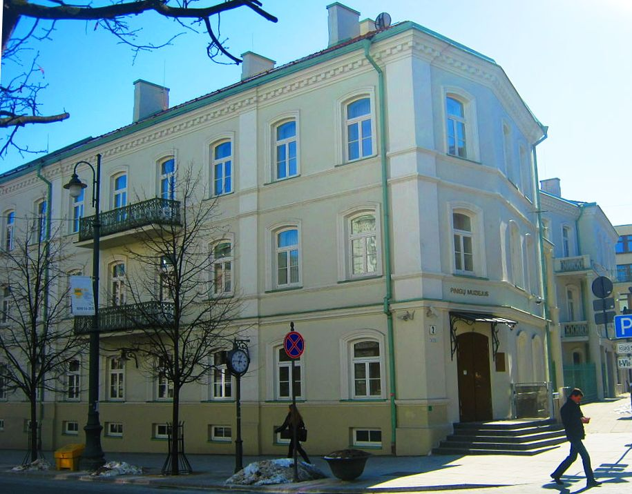 Pinigų muziejus, Vilnius